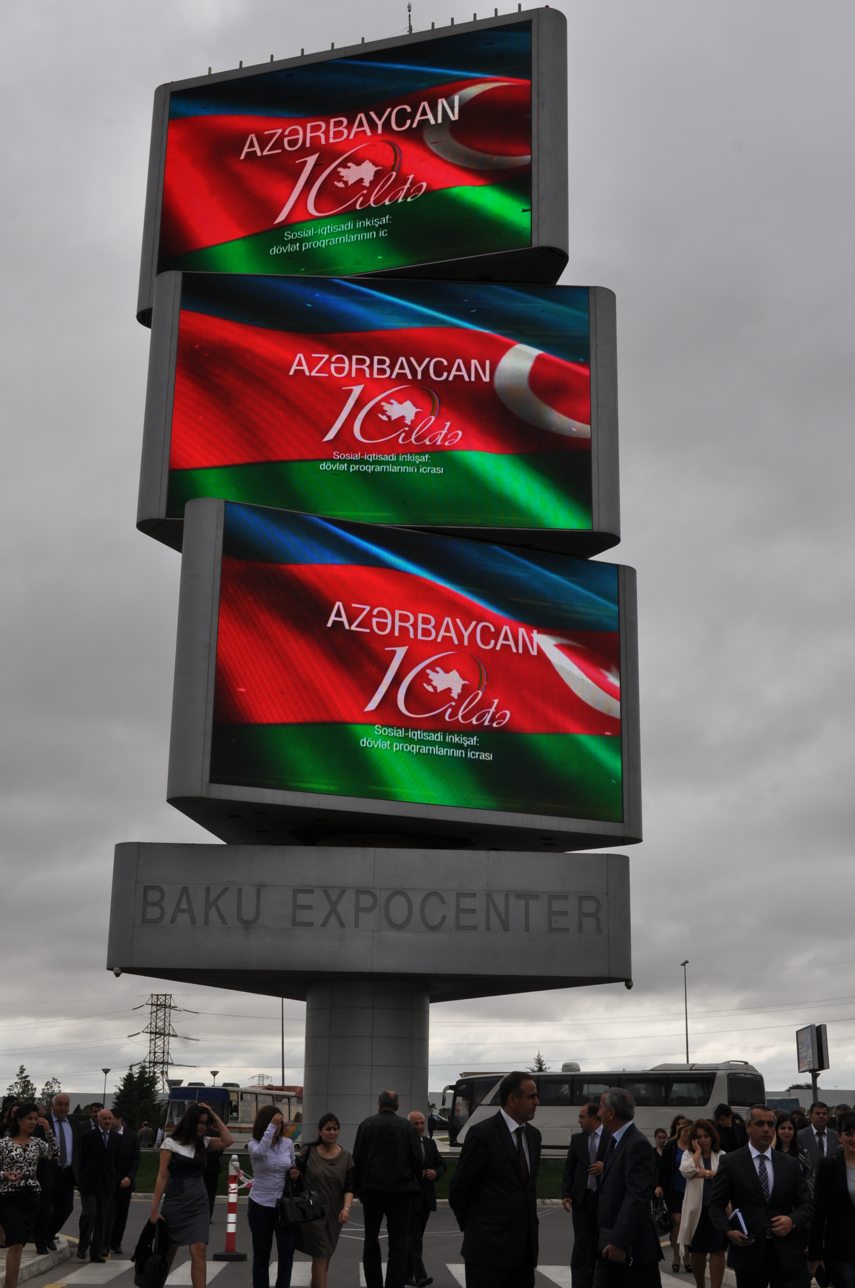 "Azərbaycan 10 ildə. Sosial-iqtisadi inkişaf: dövlət proqramlarının icrası" sərgisi